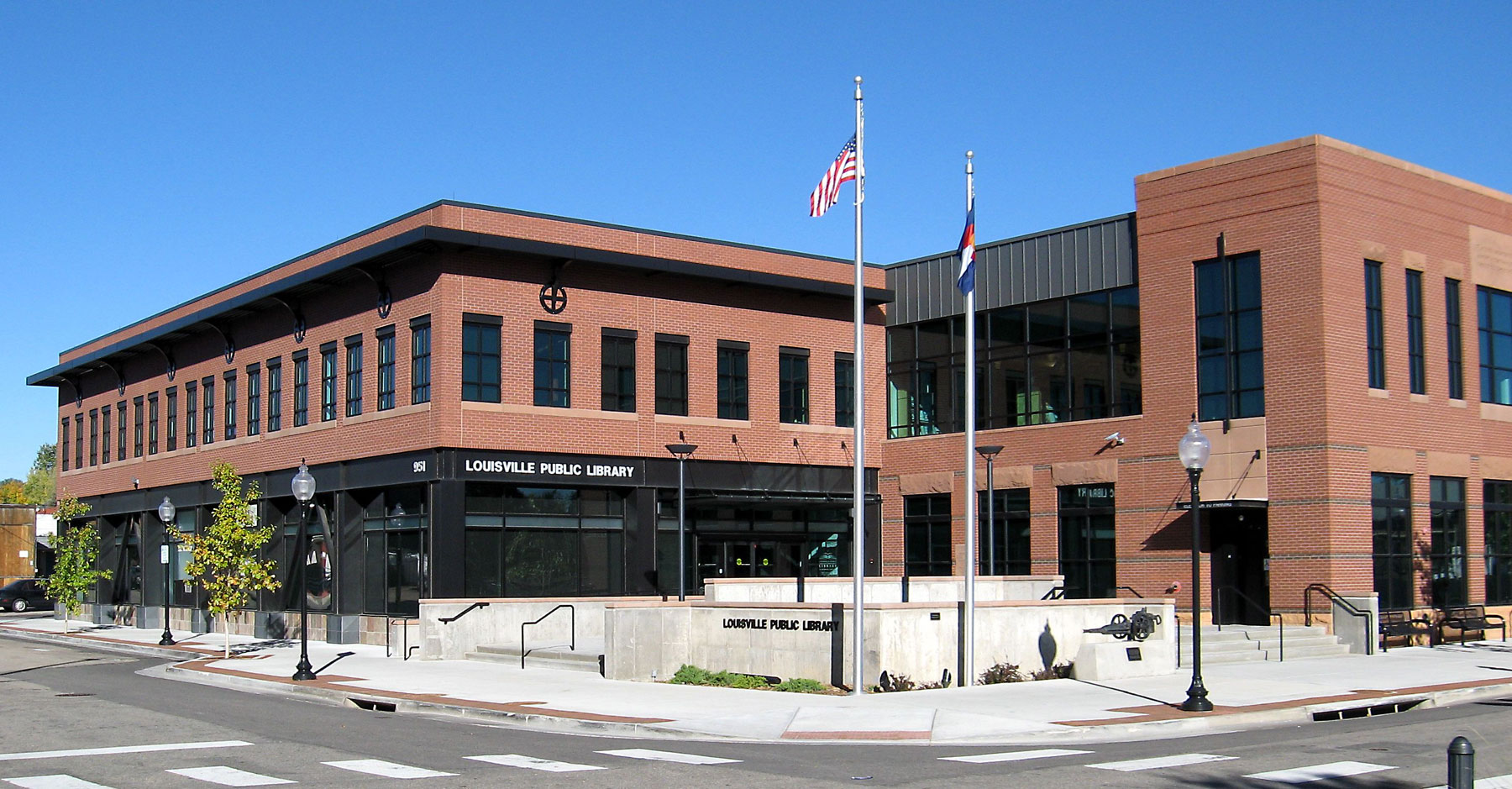 Louisville (Colorado, USA) Public Library